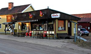 Kiosken i Venjan Foto:Bengt B